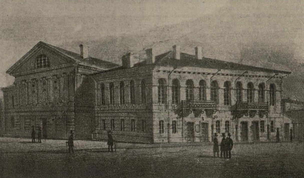 Teatrul Naţional din Copou (Iaşi, 1846). Inaugurat pe 22 decembrie 1846, mistuit de foc în noaptea dintre 17-18 februarie 1888.